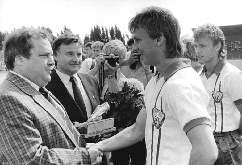 ADN-ZB-Oberst-13.8.88-frs- Berlin: Fußball-Oberliga- Auftakt- Asuzeichnung von Andreas Thom- Vor Beginn des Oberliga-Spiels BFC Dynamo-HFC Chemie zeichnete der Chefredakteur der "Fußballwoche", Jürgen Nöldner (l.), den Nationalspieler Andreas Thom vom BFC als Fußballer des Jahres mit dem Silbernen Fußballschuh der "Fußballwoche" aus. 2.v.l. Wolfgang Spitzner, Vizepräsident des DTSB und Generalsekretär des DFV der DDR."